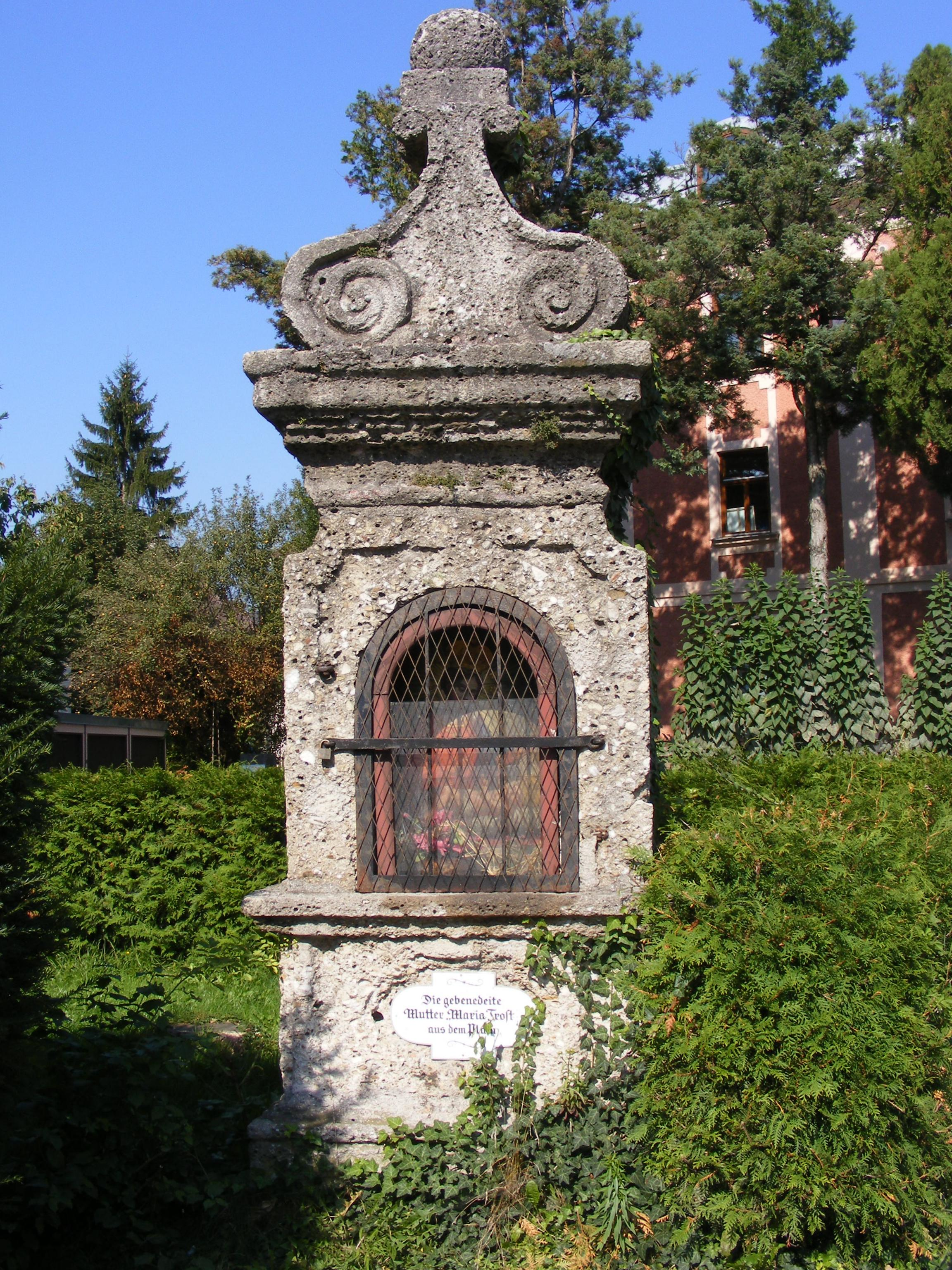 Bildstock